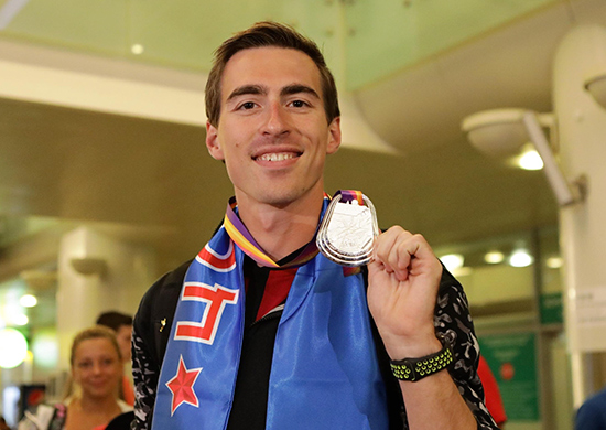 Шубенков Сергей Владимирович